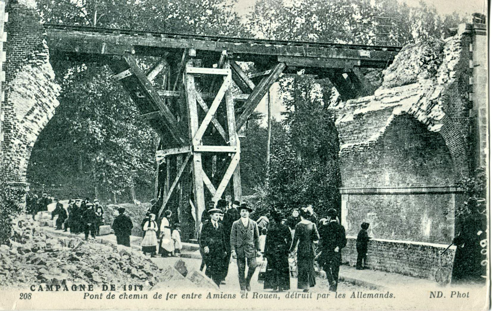 Carte postale ancienne éditée par ND N°208Campagne de 1914 : Pont de chemin de fer entre Amiens et Rouen, détruit par les AllemandsL'ouvrage d'art concerné de la ligne Amiens - Rouen n'est pas identifiable, en raison de la censure.